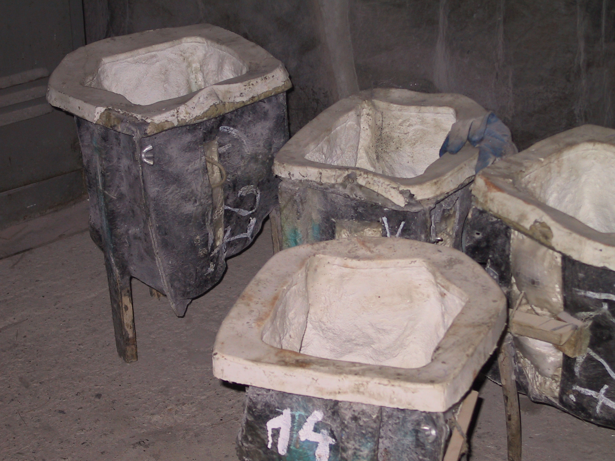 Zdjęcie form silikonowych z których produkowane są sztuczne skały felsdekor